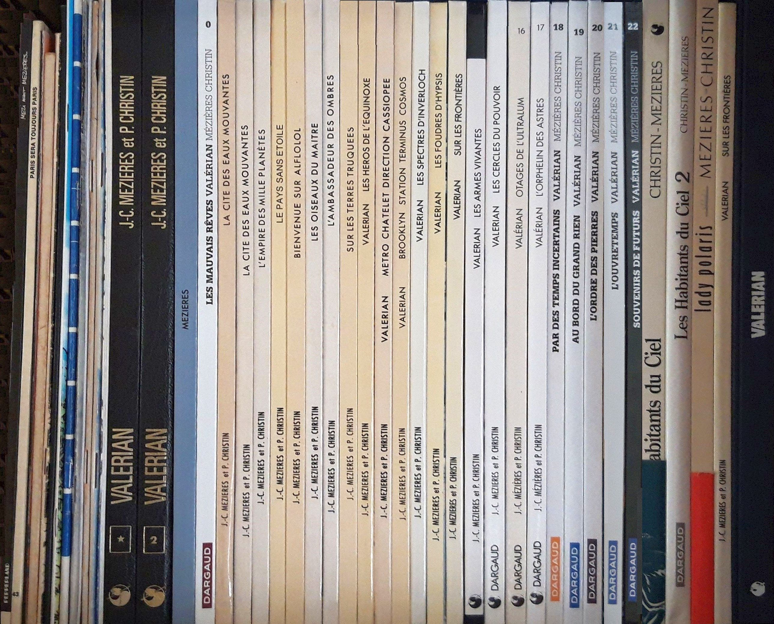 Série Valerian - Mézières - Christin.